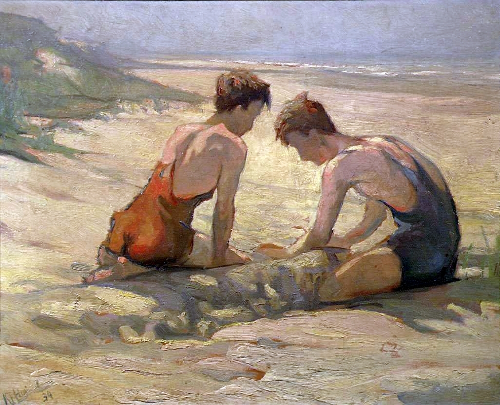 Afgebeeld zijn de zoons van Huineman op 17 en 15 jarige leeftijd, gesitueerd op het strand bij Vrouwenpolder. Op de achterkant stadsgezicht (poort).